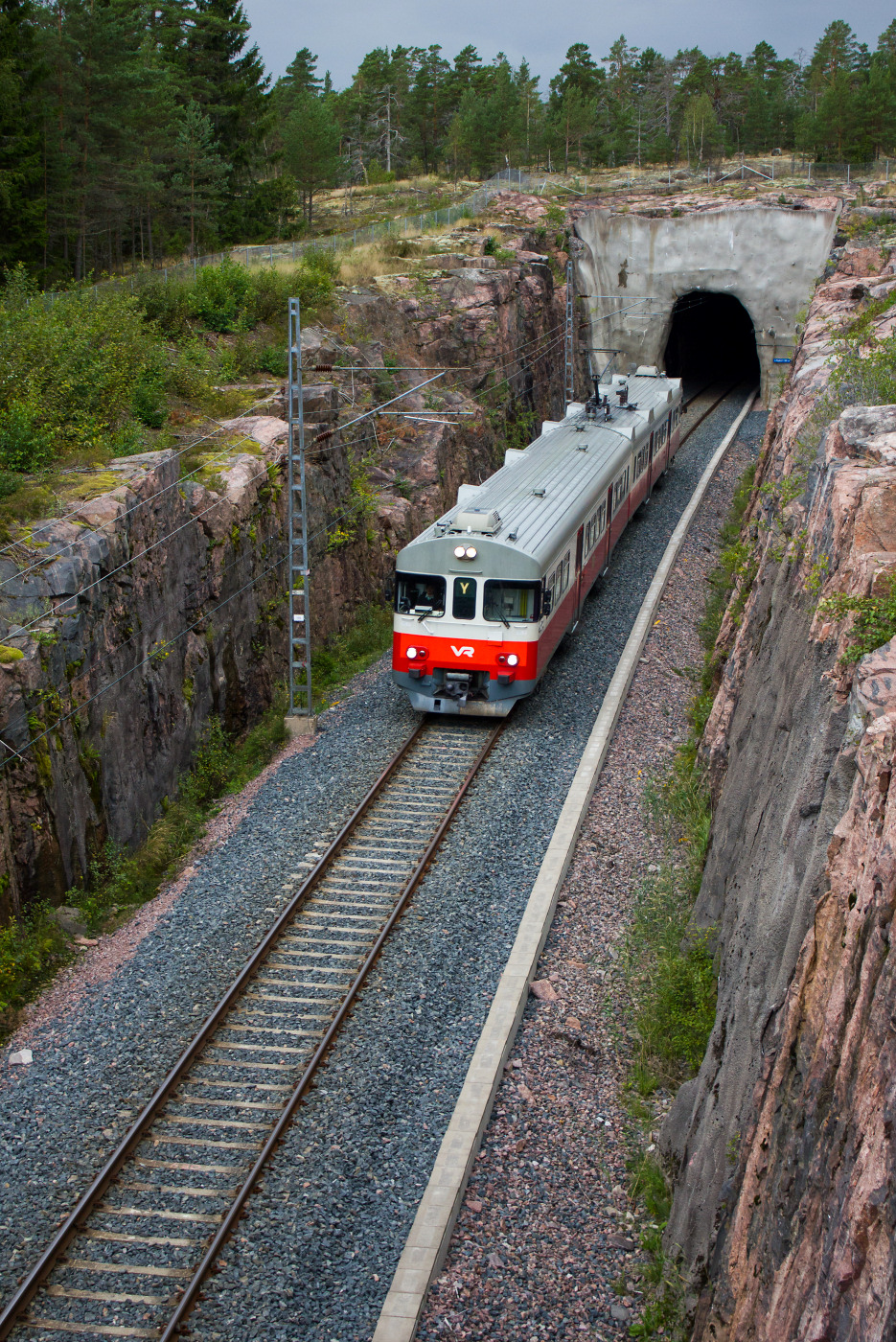 Y-juna (Sm2 6072) Karjaalta Helsinkiin tulossa Lillgårdin rautatietunnelista.